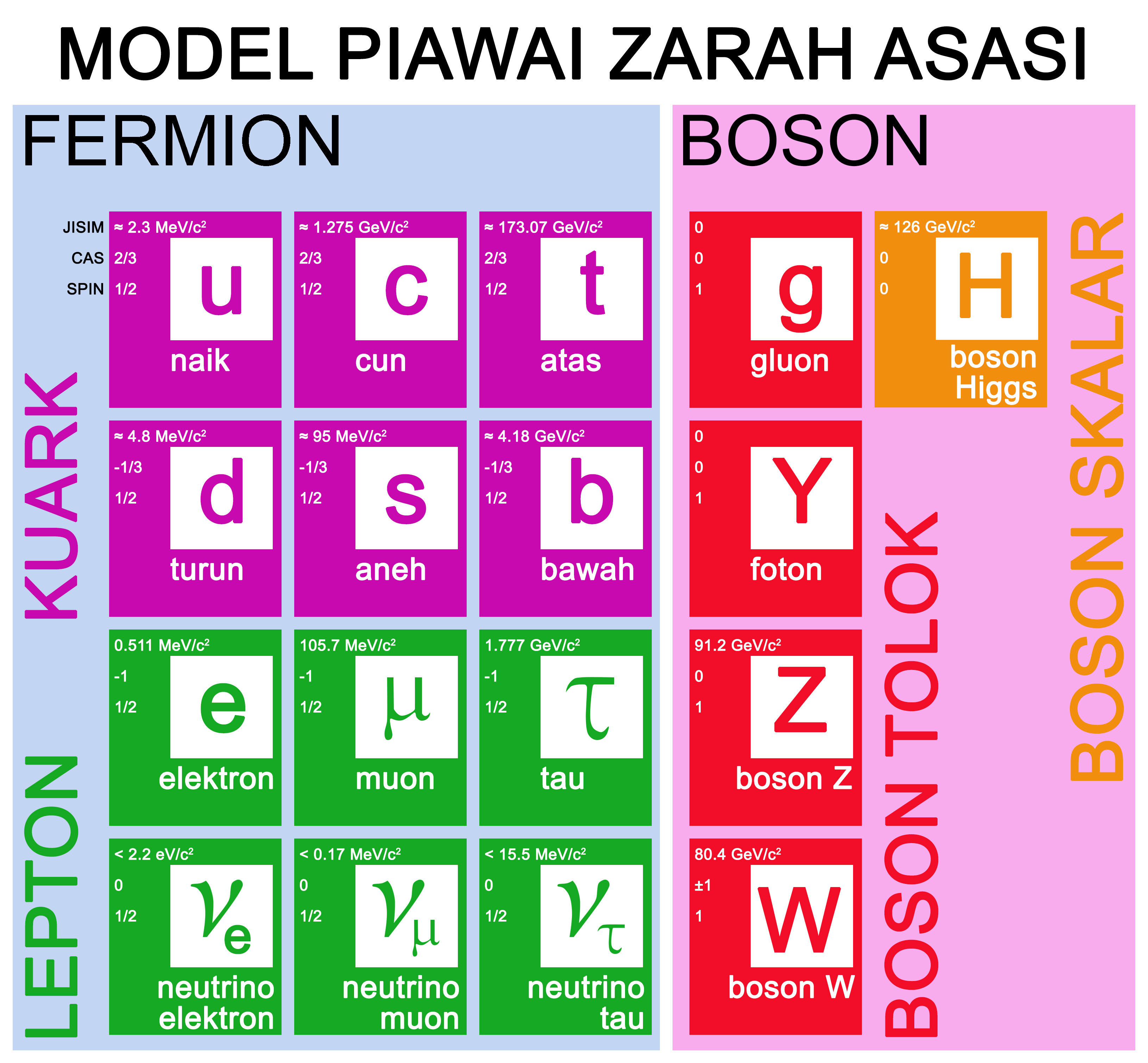 Model Piawai dalam Bahasa Melayu